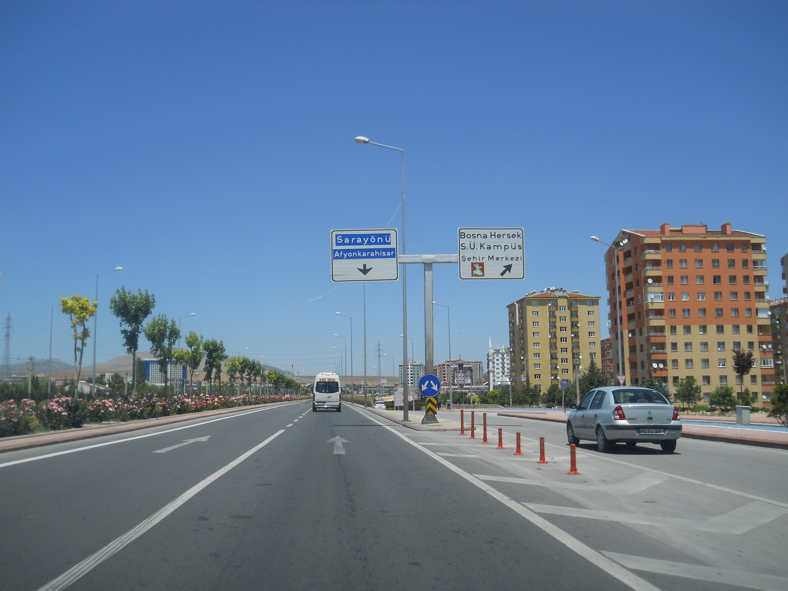 D-300 karayolu, Selçuklu,Konya, Turkey